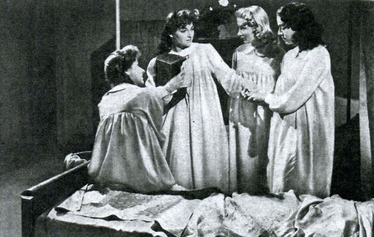 Quarta pagina (Manzari, 1943) - foto scena